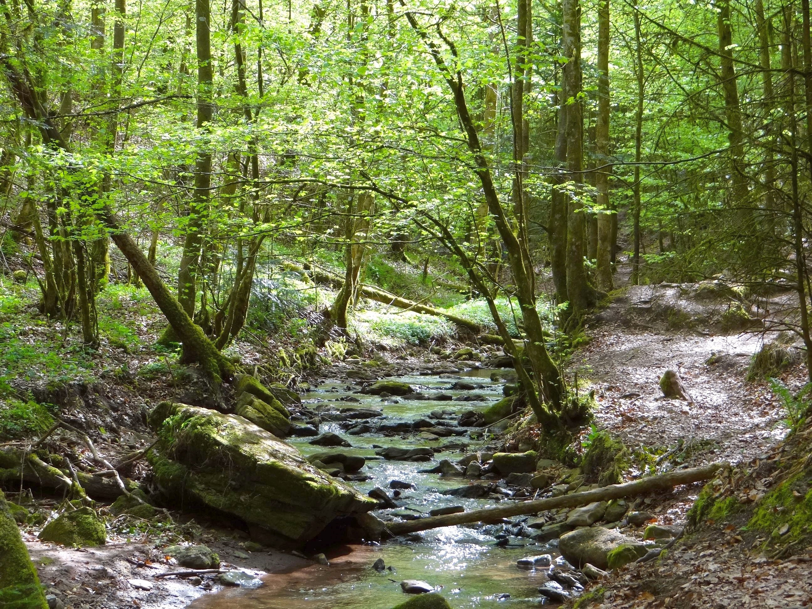 Der Hörschbach im Naturschutzgebiet „Hörschbachschlucht“ (NSG 1.208) im Rems-Murr-Kreis, Baden-Württemberg